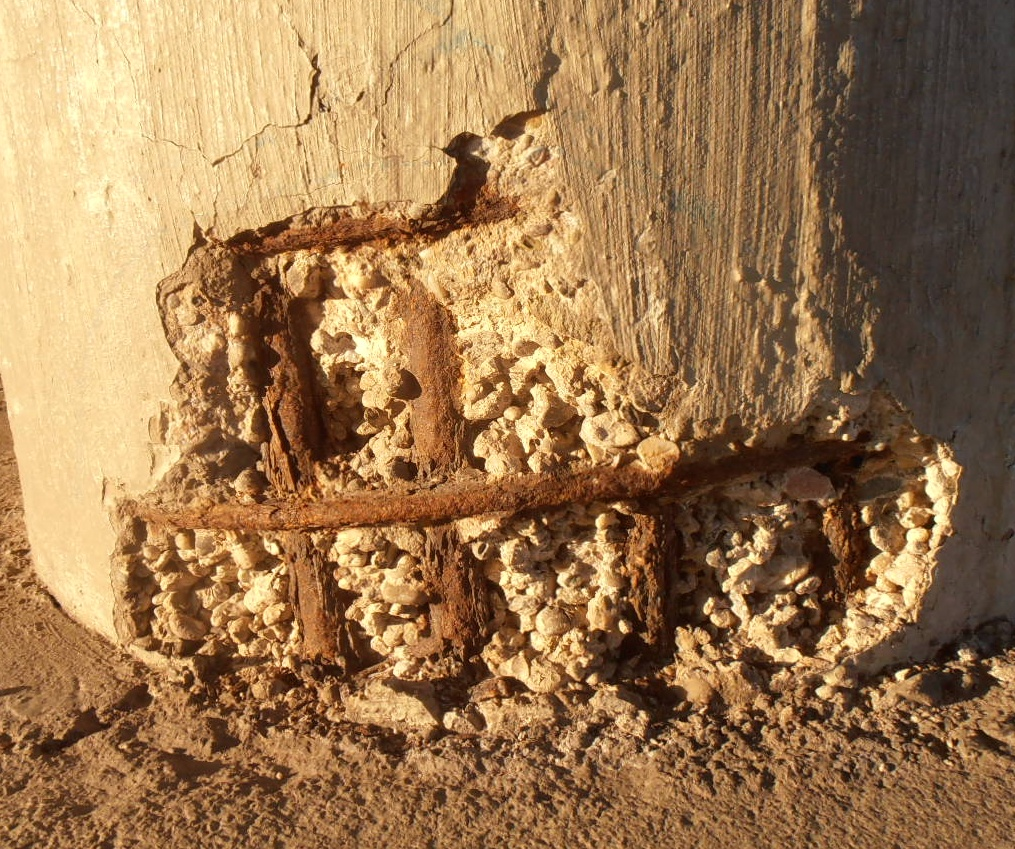 Betonabplatzung, Schaden an einem Brückenpfeiler der B27 Überbrückung der Bahnhofstraße in BFH Kochendorf Dieser Baumangel zeigt die viel zu geringe Betonüberdeckung der Stahbewehrung und die offensichtlich nicht ausreichende Beton-Qualität, beides ließ die Armierung oxydieren.